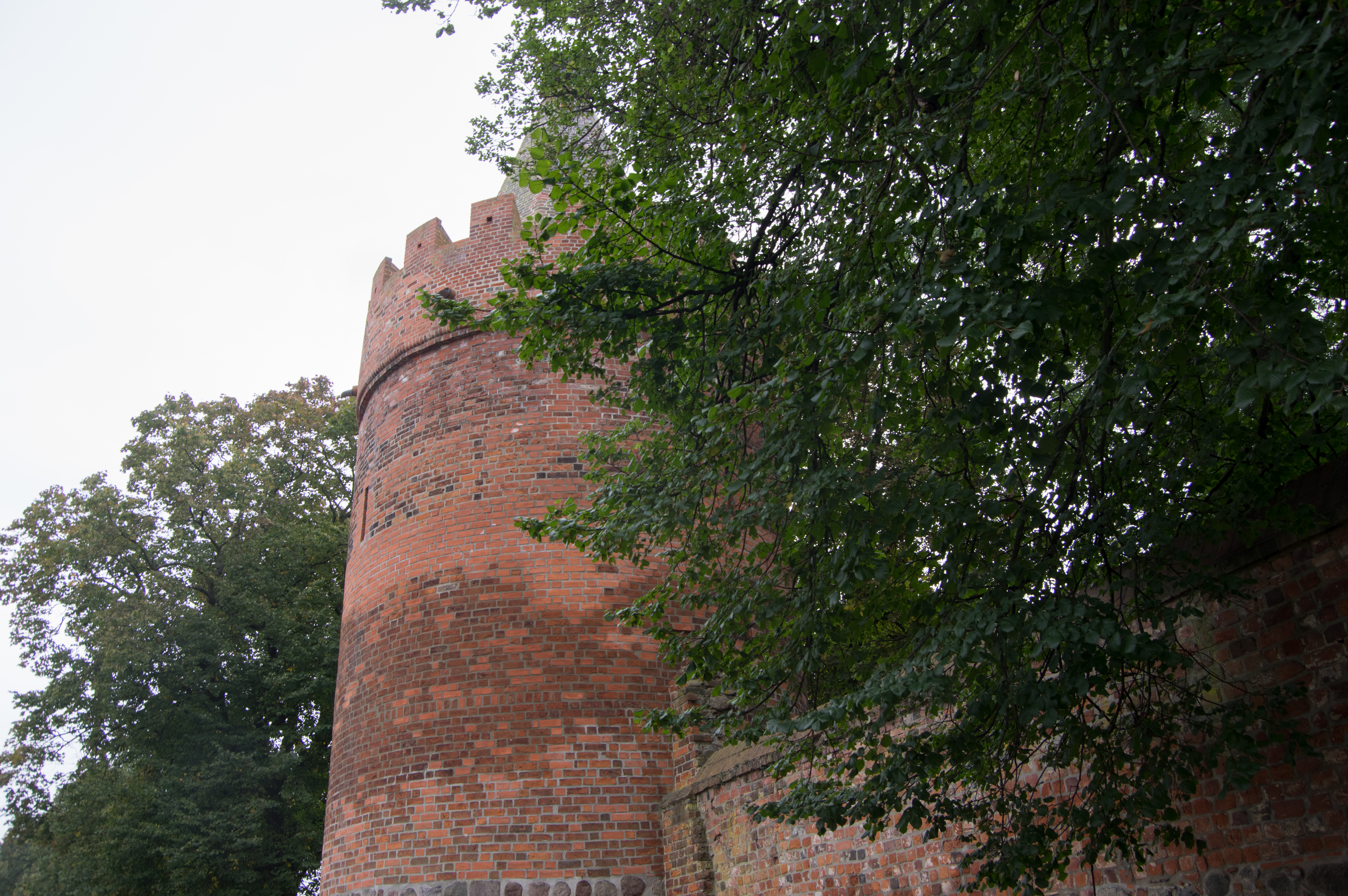 Angermünde in Brandenburg. Die Stadtbefestigung steht unter Denkmalschutz. Hier der Pulverturm.